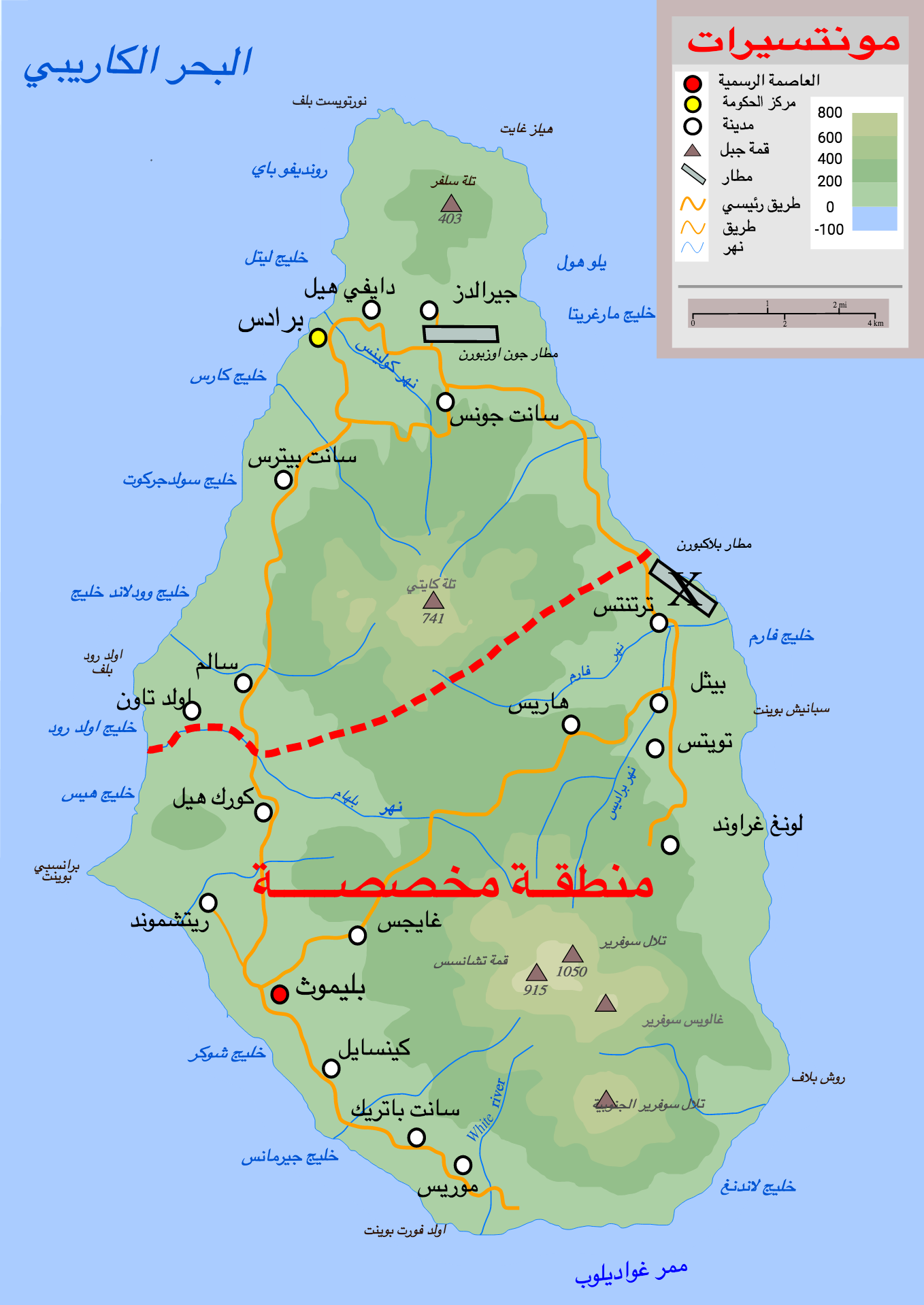 خريطة طبوغرافية لمونتسرات